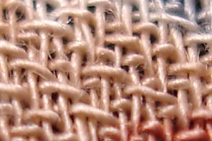 Un particolare ingrandito di una gonna in rayon.